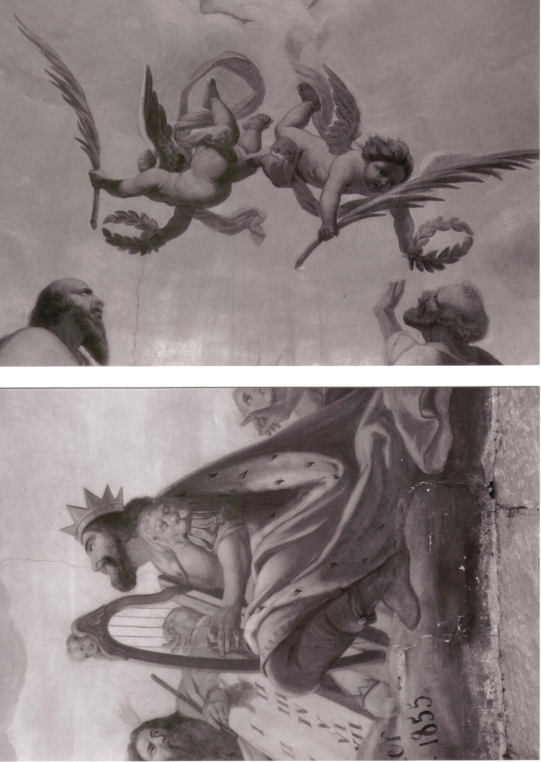 Détails des peintures du choeur de l'eglise de Maranville (Haute-Marne)réalisés par Menissier en 1855.